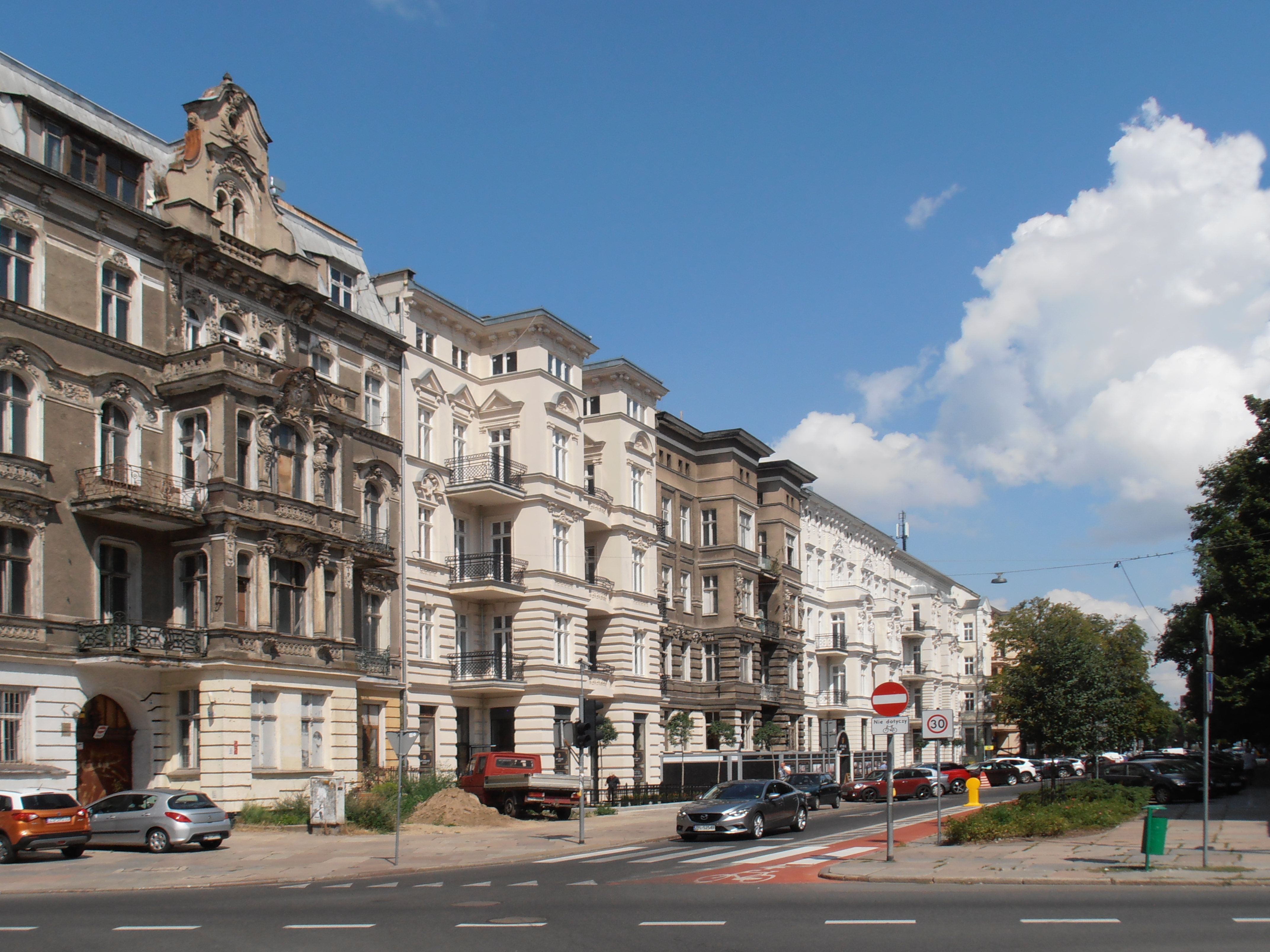 Ulica Śląska w Szczecinie, 2018 r.